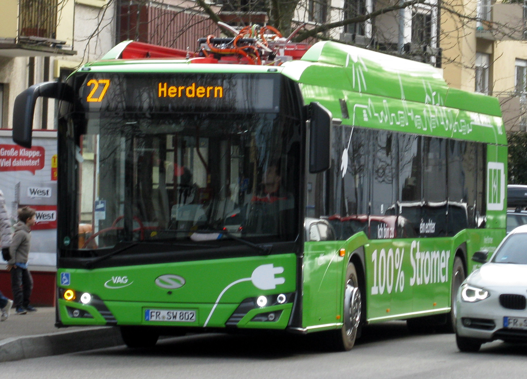 Solaris Urbino 12 electric von der Freiburger Verkehrs AG auf der Linie 27 an der Haltestelle Herdern Kirche